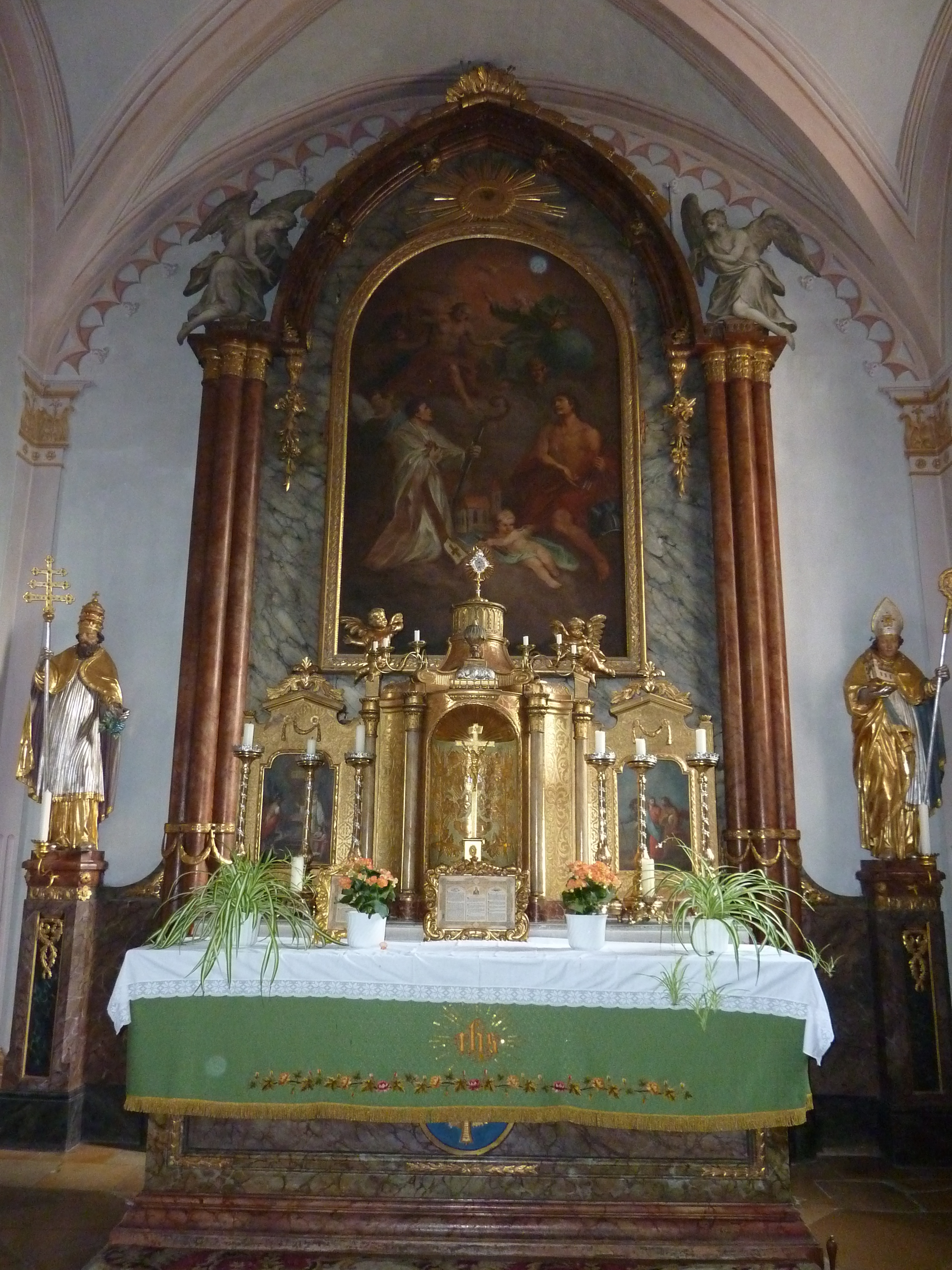 Pfarrkirche in Furth bei Göttweig in Niederösterreich - Hochaltar hl. Wolfgang und hl. Sebastian unter Dreifaltigkeit, Leopold Mitterhofer (1799); integrierte Bilder Abraham vor Melchisedek, Christus in Emmaus beidseits des Tabernakels von Andreas Rudroff (1812)